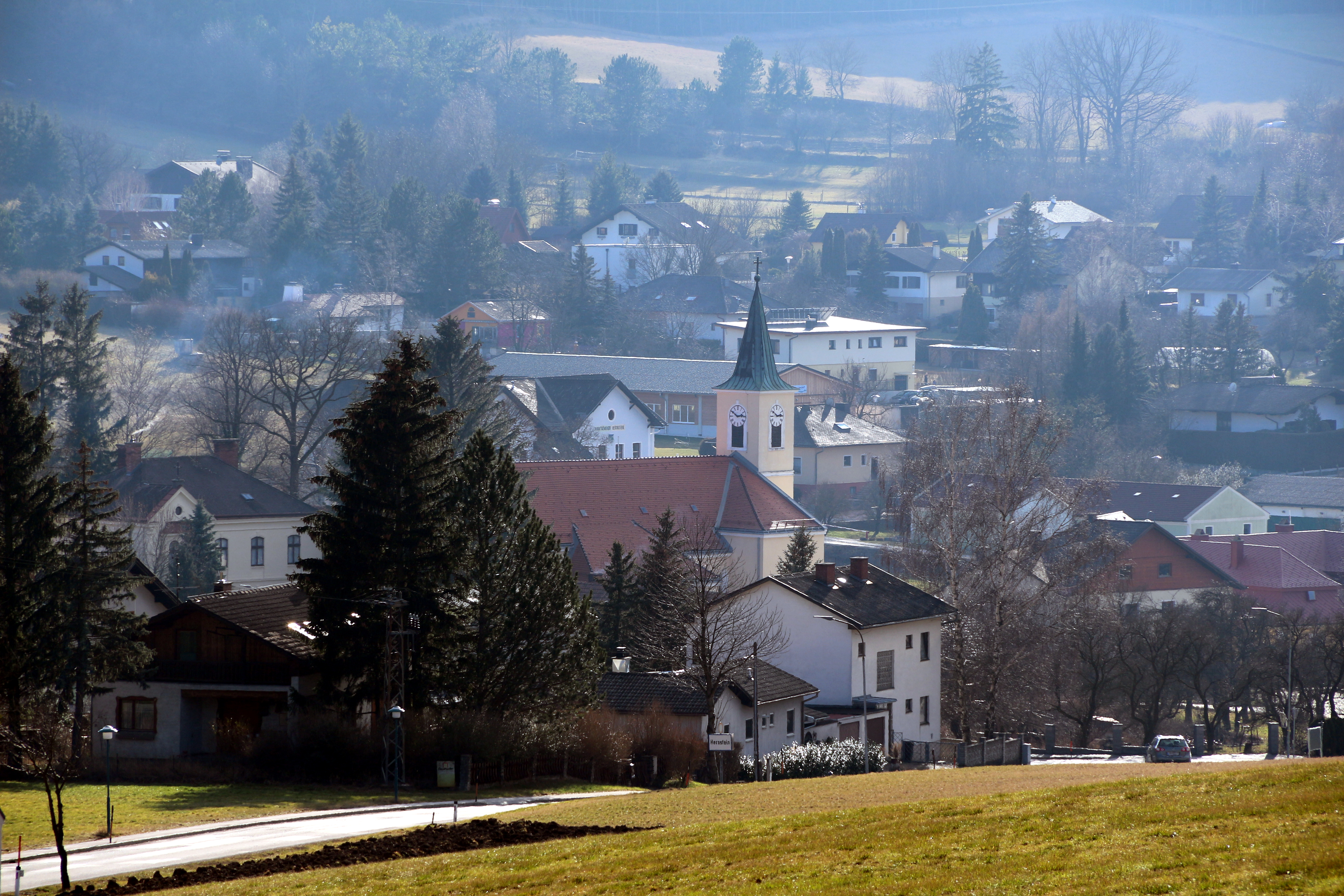 Kath. Pfarrkirche hl. Laurenz in Hernstein, Niederösterreich.